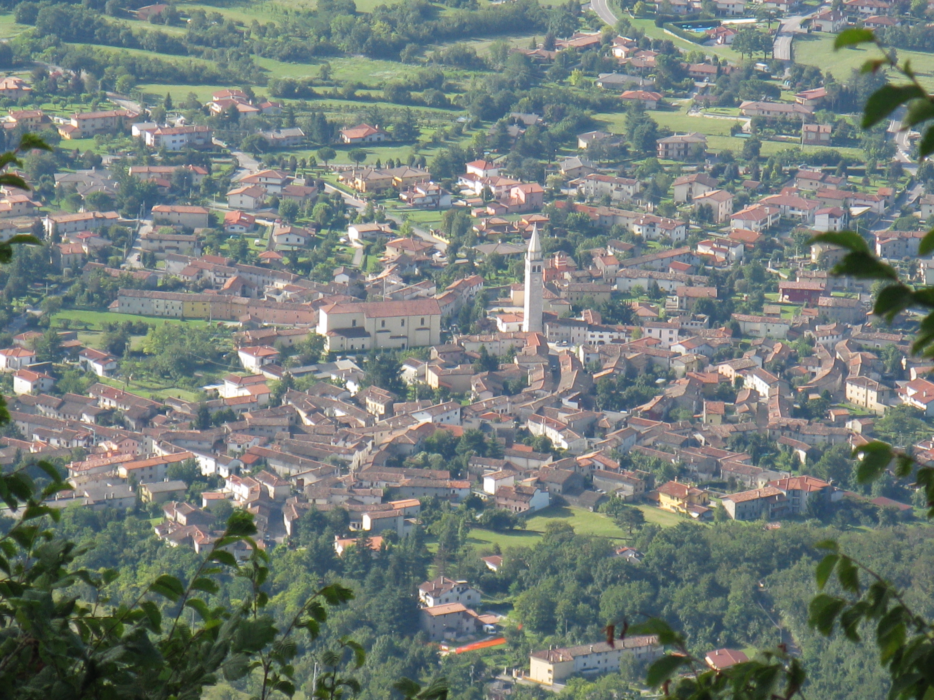 Panorama Dardago